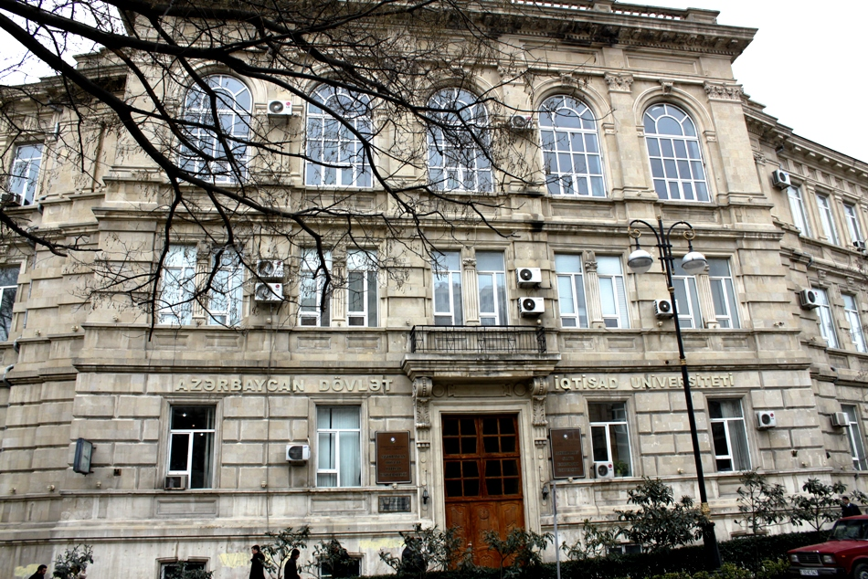 Азербайджанский государственный экономический университет